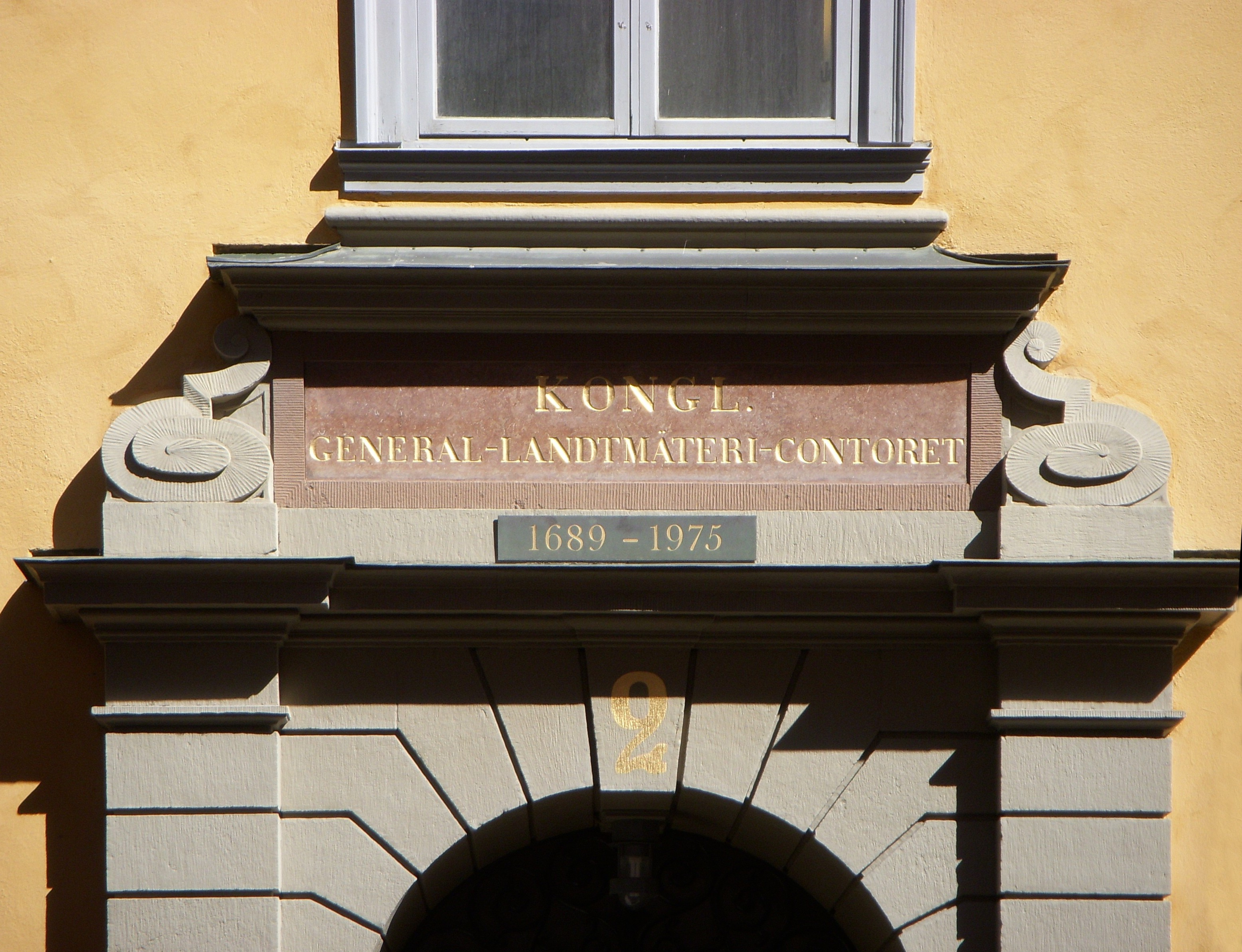 Portalinskription på Lantmäteristyrelsens hus vid Västra trädgårdsgatan 2 i Stockholm